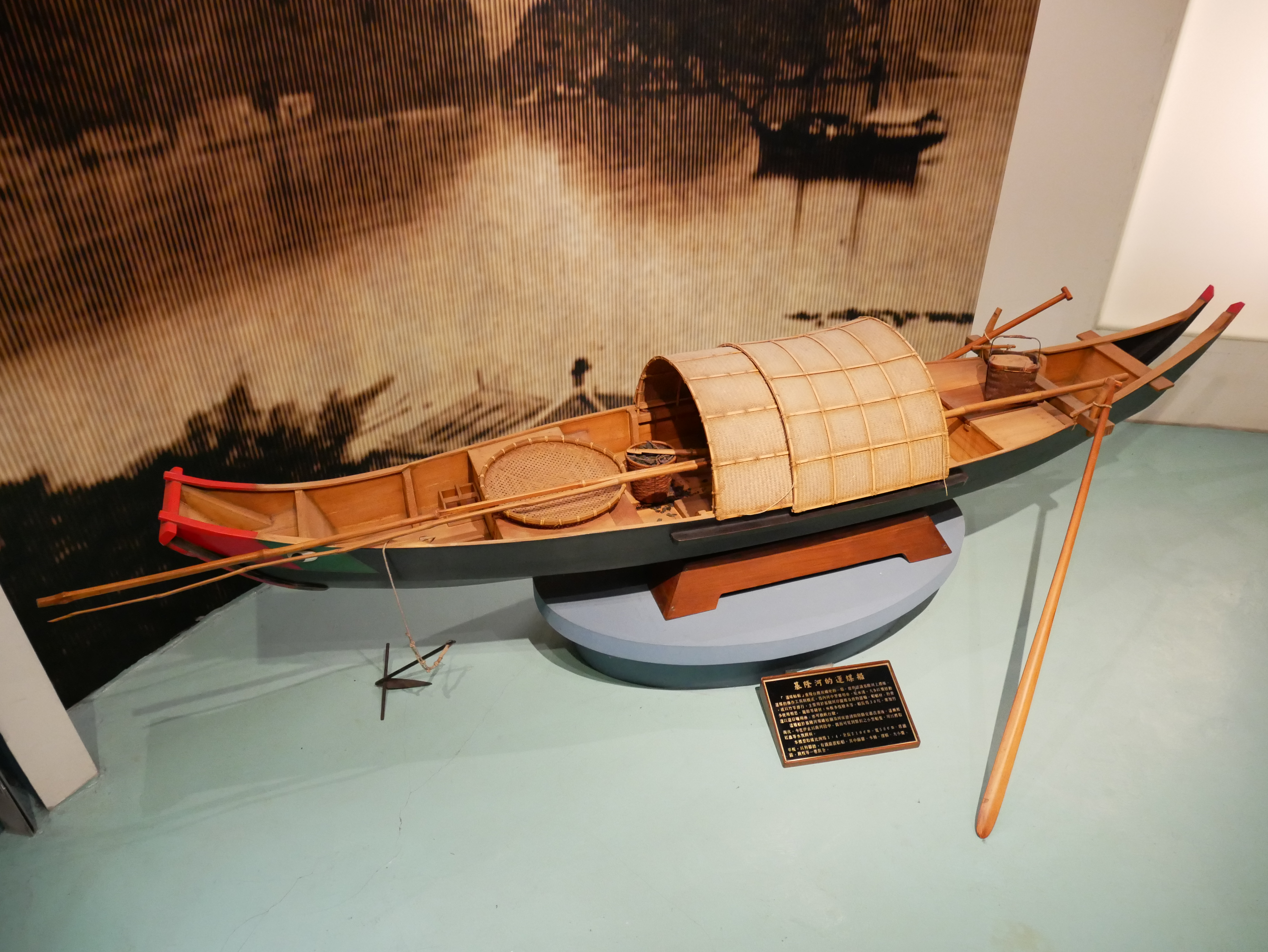 中文（台灣）: 基隆故事館展示的基隆河運煤舢舨模型。